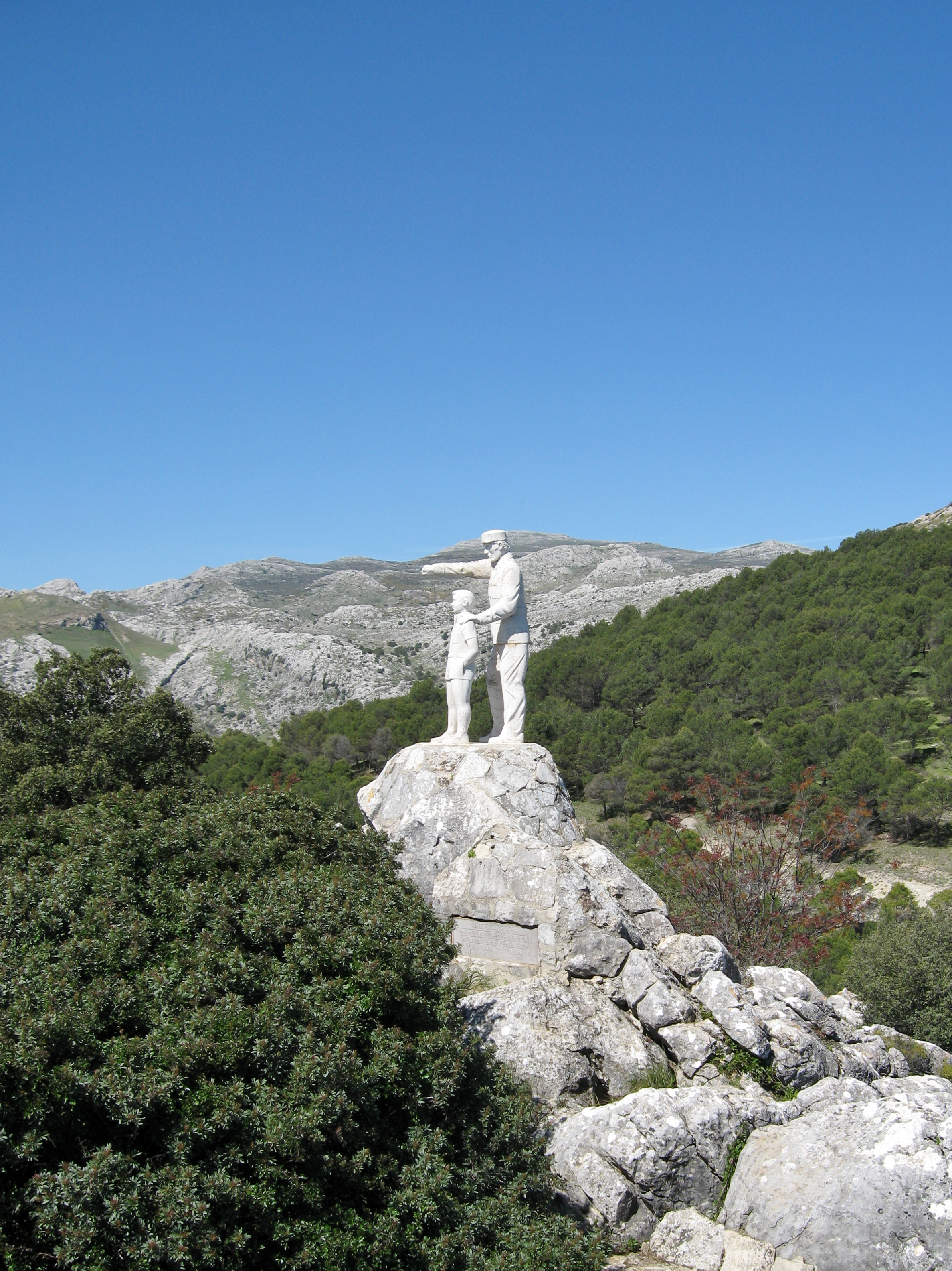 Mirador del Guarda Forestal, El Burgo, Málaga, Andalucía (Andalusien), España (Spanien)